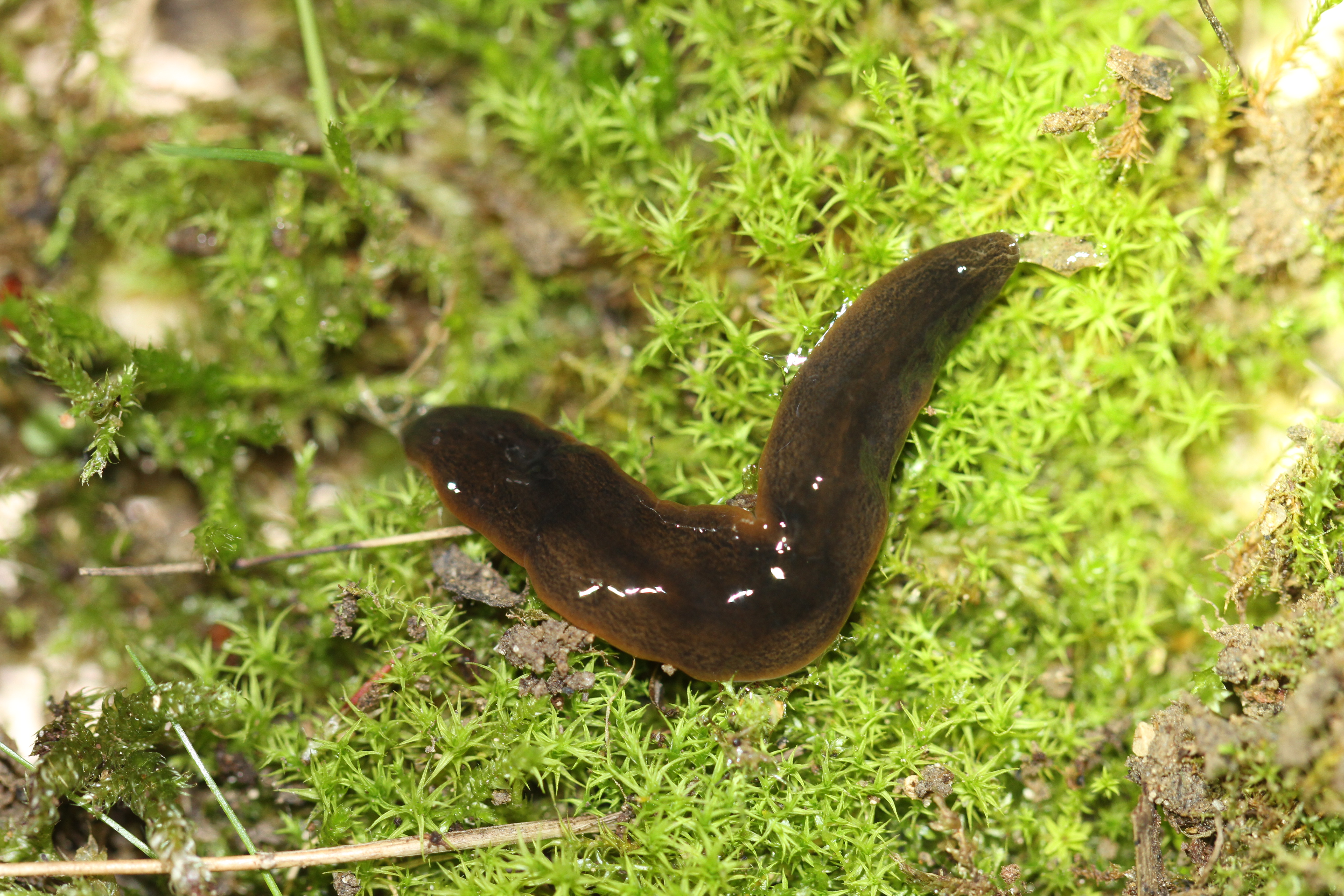 Planaire terrestre invasive Geoplanidae, Obama nungara. Bois de Vincennes, Paris (75), France